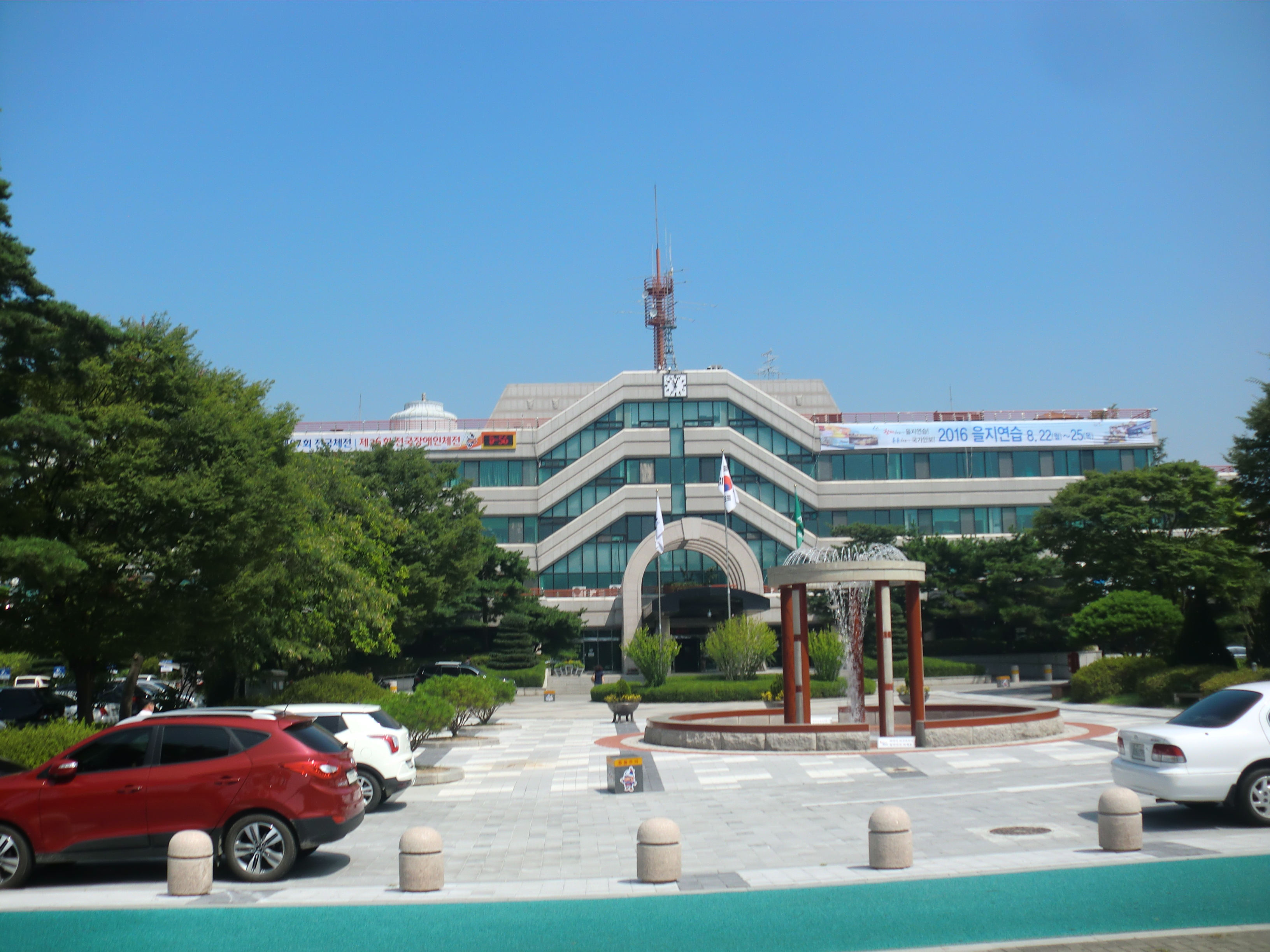 충청남도 아산시에 있는 아산시청